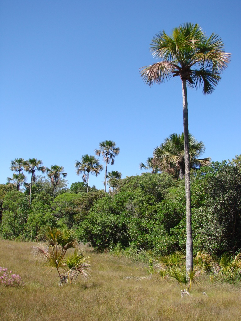 Mauritia flexuosa - ARECACEAE Reserva Extrativista de Recanto das Araras de Terra Ronca - São Domingos - Goiás - Brasil.